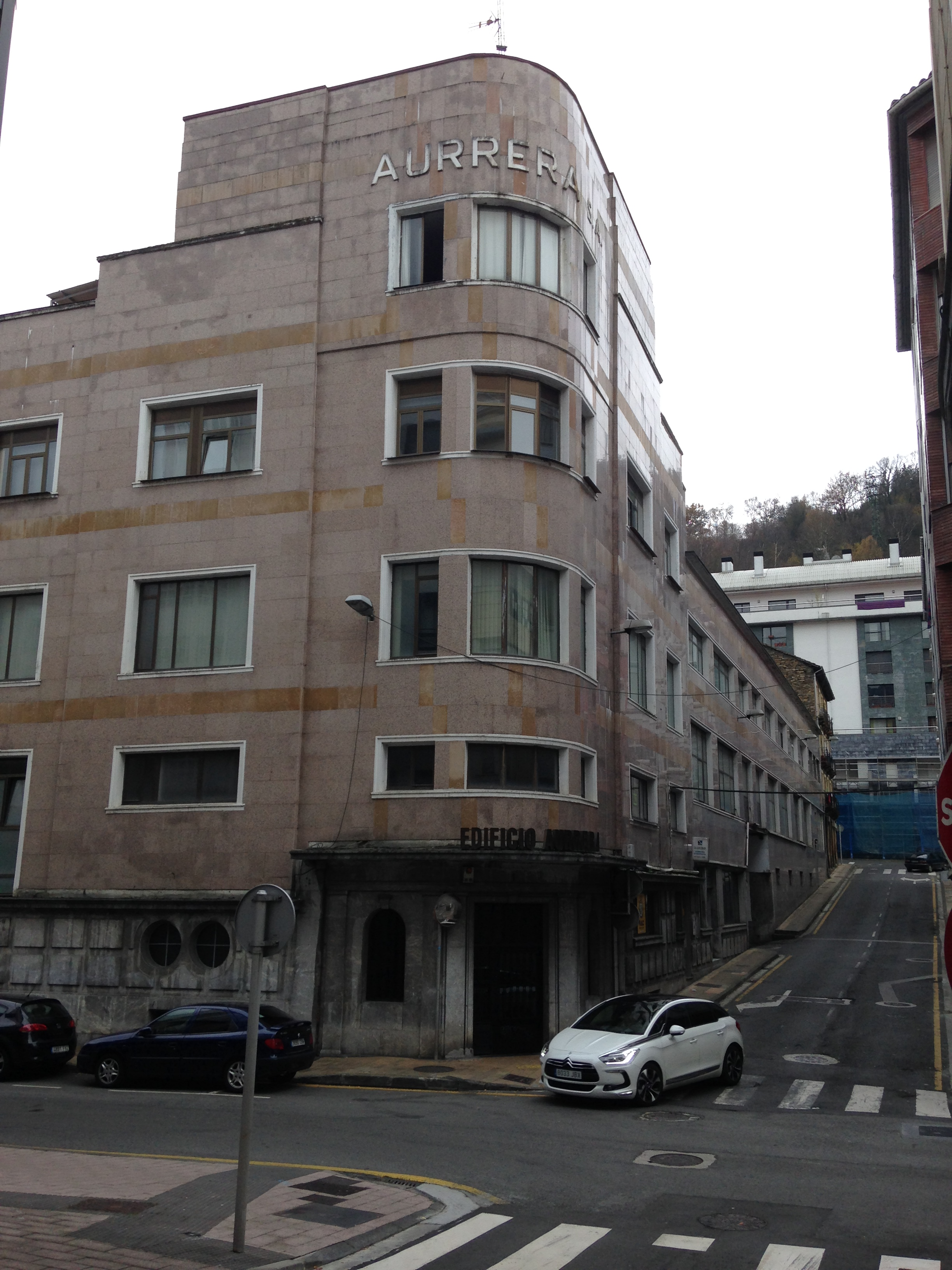 Edificio de la antigua fundición Aurrerá en Eibar (País Vasco España) reutilizado como oficinas y locales comerciales así como garajes.